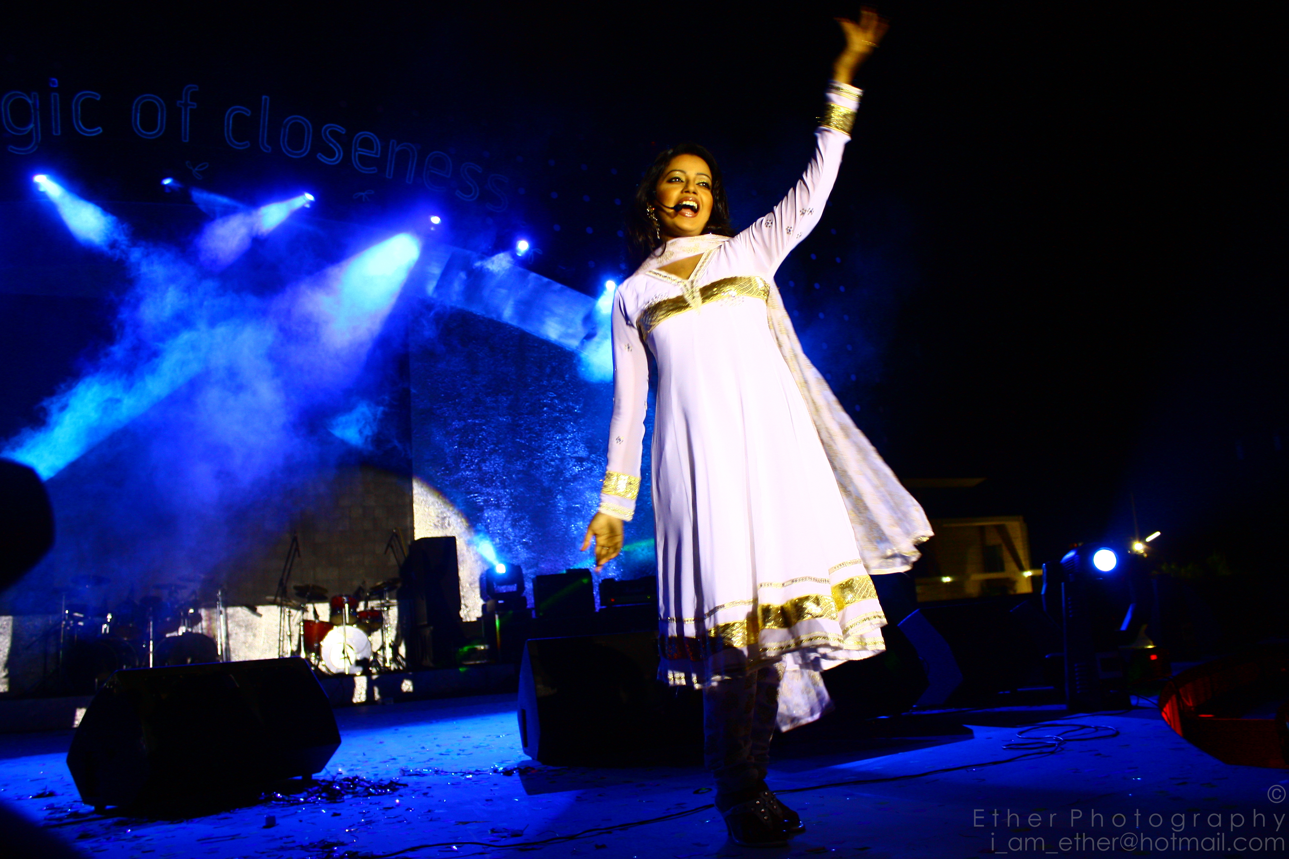 Taken During GP Night 2009